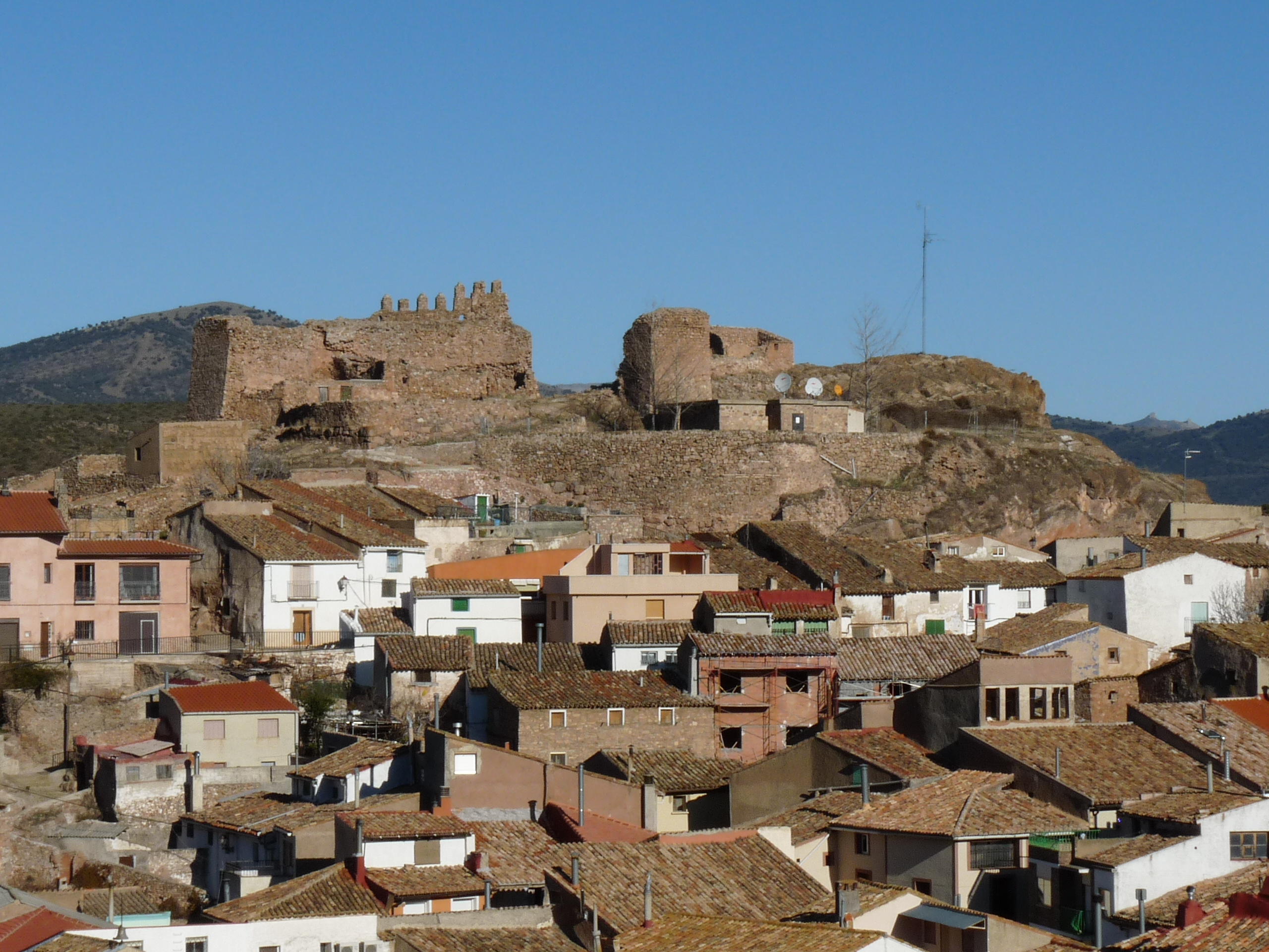 Aranda de Moncayo - Castillo musulmán s. XI